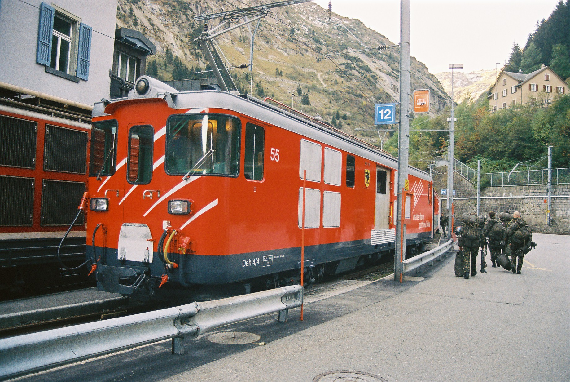 Deh 4/4 I 55 der Matterhorn-Gotthard-Bahn in Göschenen